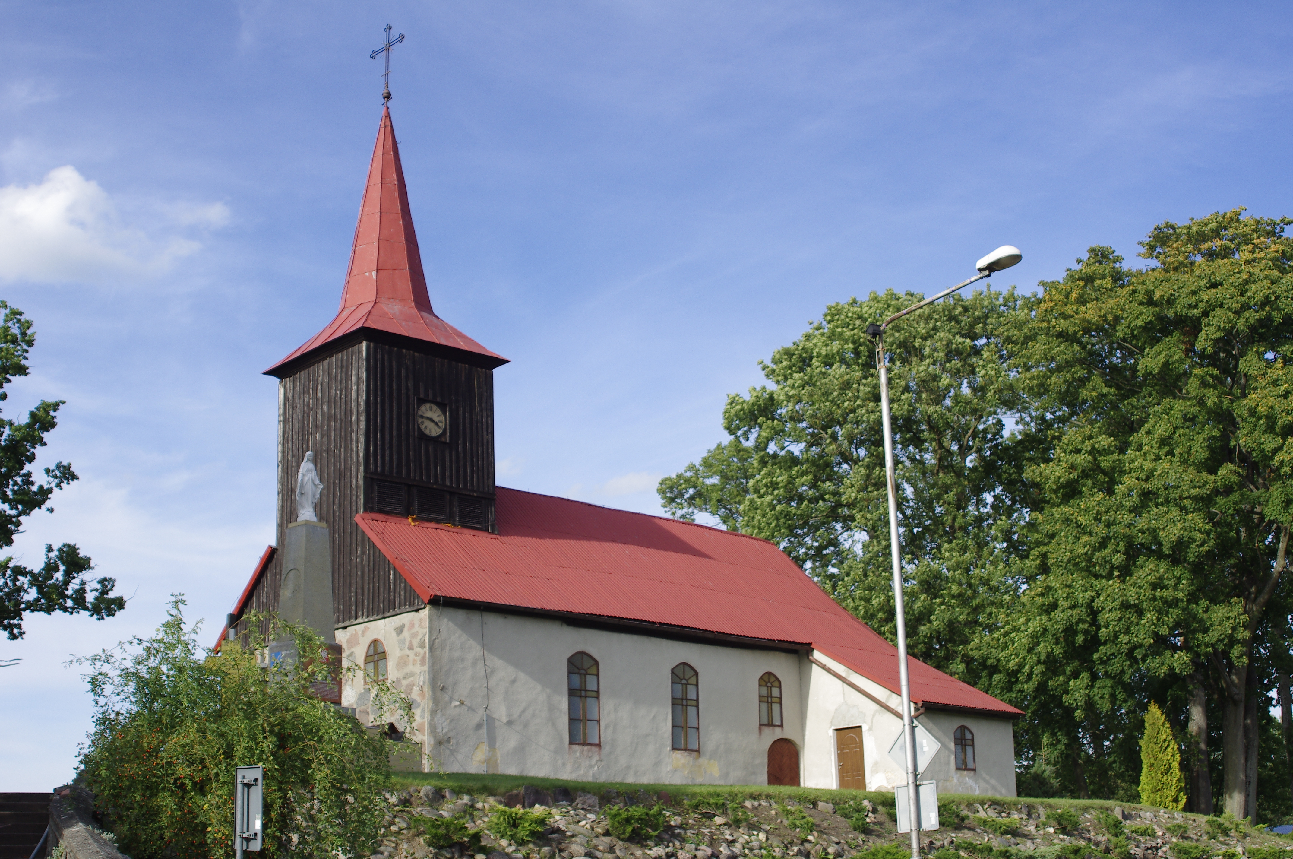 kościół Niepokalanego Poczęcia NMP widok z drogi Ostrowice, Ostrowice